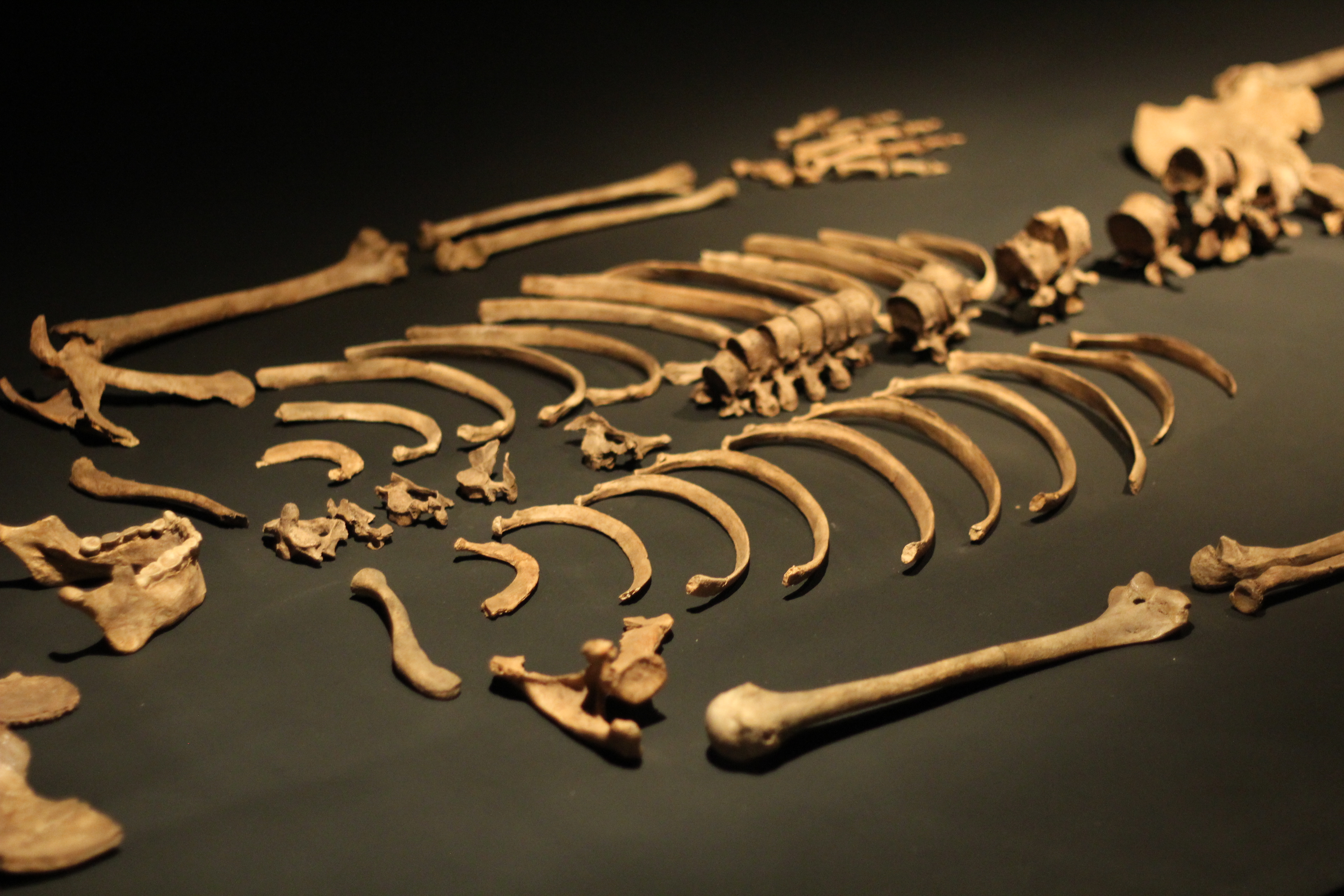 Esqueleto humano pertencente ao Museu do Homem Americano. São Raimundo Nonato, PI, Brasil Da placa explicativa: "Esqueleto Toca da Janela da Barra do Antonião / 9.850 anos / Réplica Esta mulher estava dormindo quando um enorme bloco, de aproximadamente cinco toneladas, desabou e a soterrou. Ela não foi completamente esmagada porque seu corpo ficou dentro de um nicho do bloco que caiu. Mas o deslocamento do ar fez explodir seu crânio."